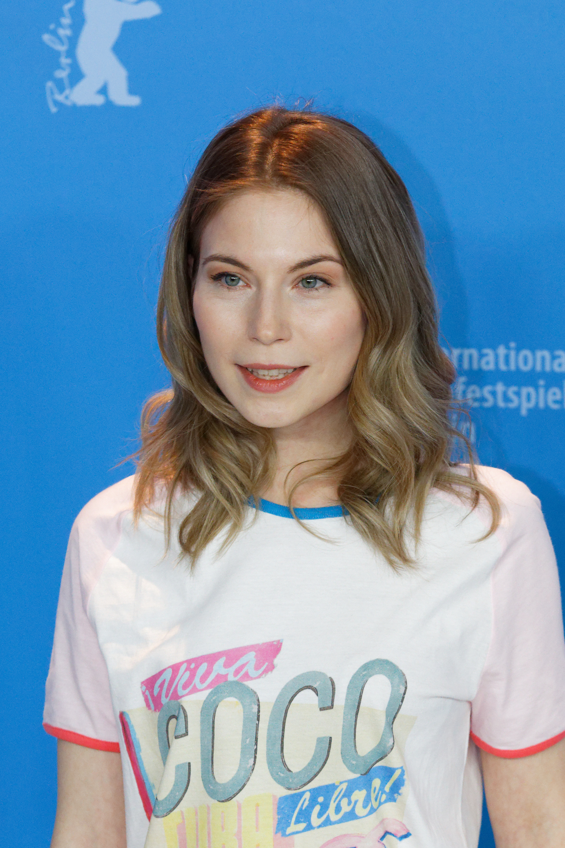 Nora Waldstätten beim Photo Call zu Wilde Maus bei der Berlinale 2017